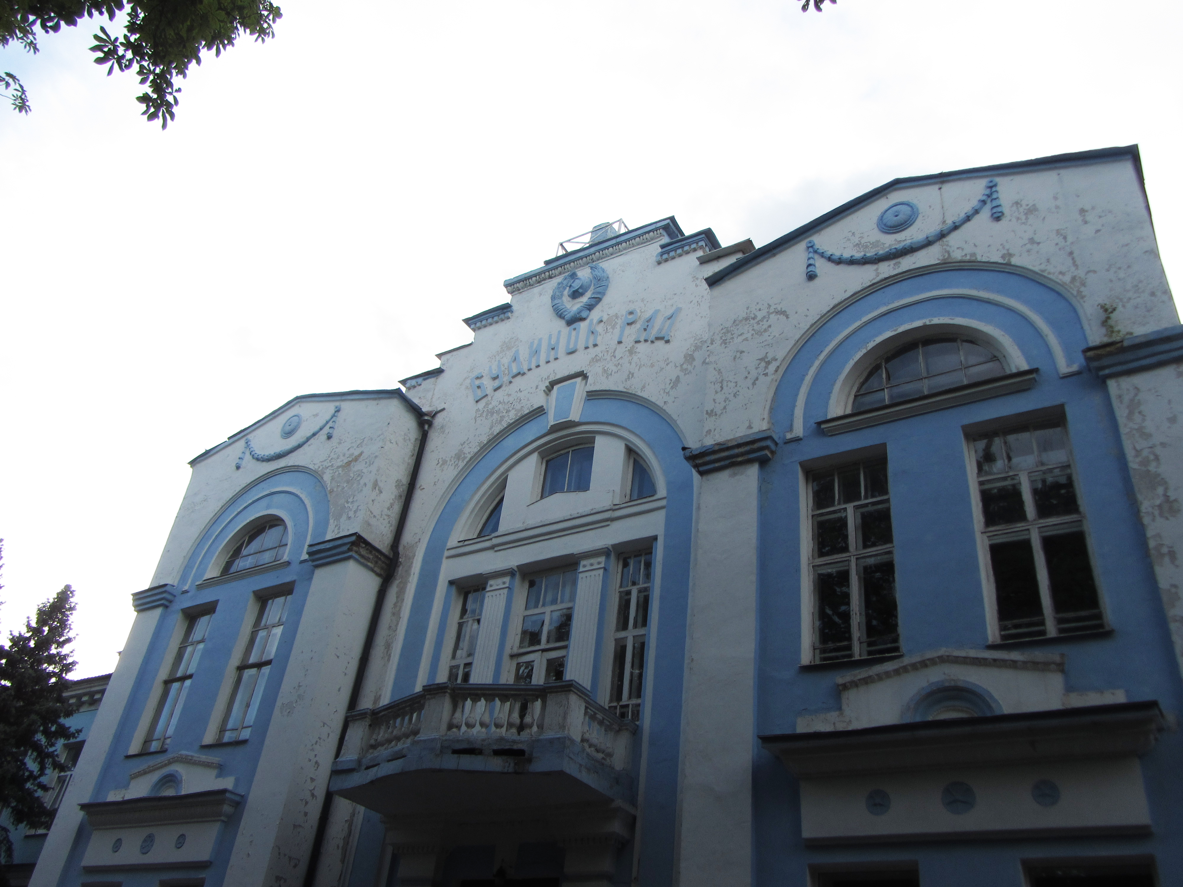 Будинок Рад, Конотоп, просп. Миру, 8.